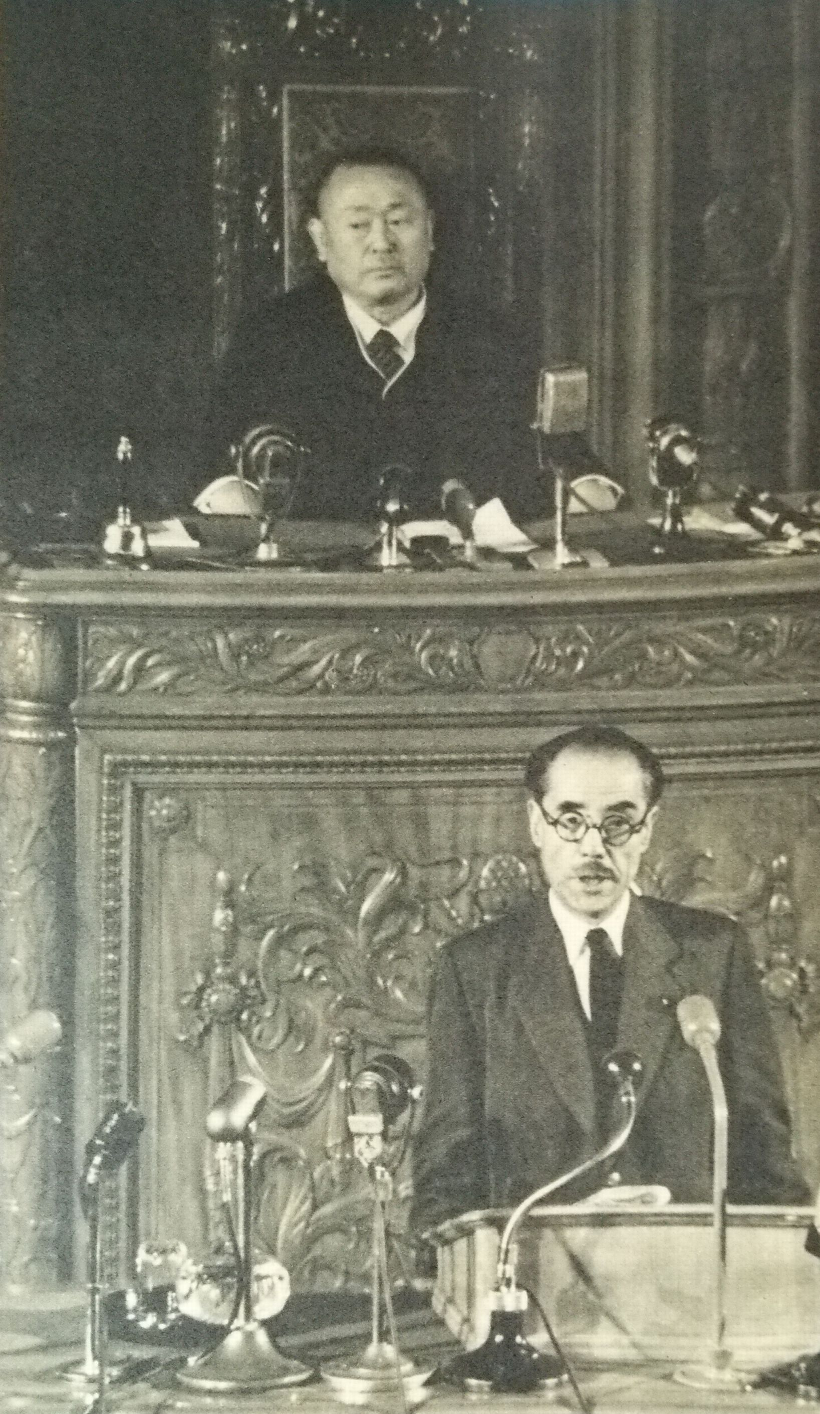 堤康次郎（上）と原彪（下）。衆議院議長および副議長就任日の1953年5月18日。